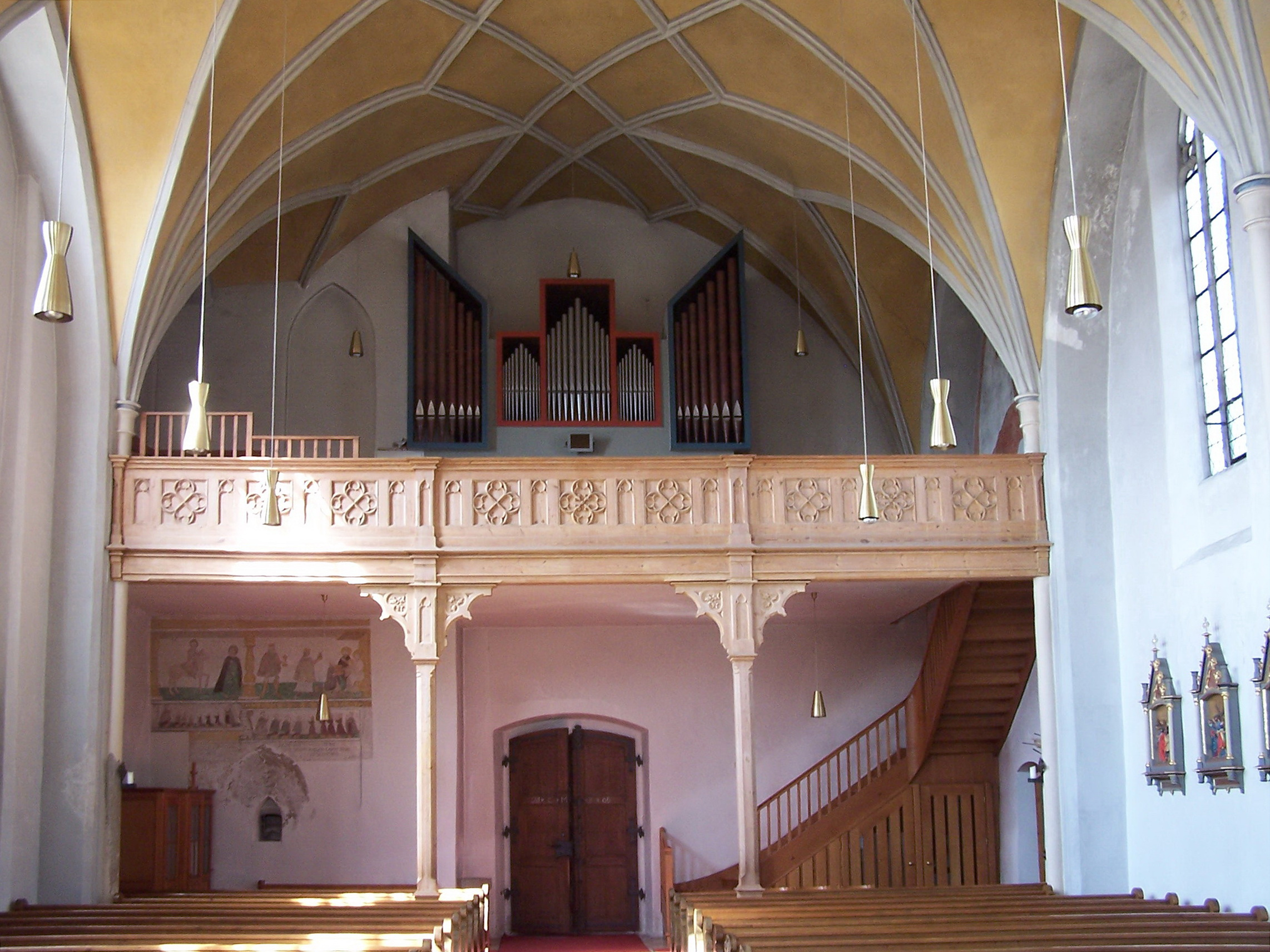 Ergolding, Lindenstraße 94. Katholische Kirche St. Peter und Paul. Saalkirche, spätgotische Anlage, zweiten Hälfte 15. Jahrhundert, Südseite mit Turm älter, Gliederung durch Streben und umlaufenden Dachfries, südseitig Chorflankenturm mit Geschossgliederung, Achteckaufsatz und Spitzhelm. Innenraum mit netzförmig figuriertem Rippengewölbe. Neugotische Einrichtung. Westempore mit Orgel.